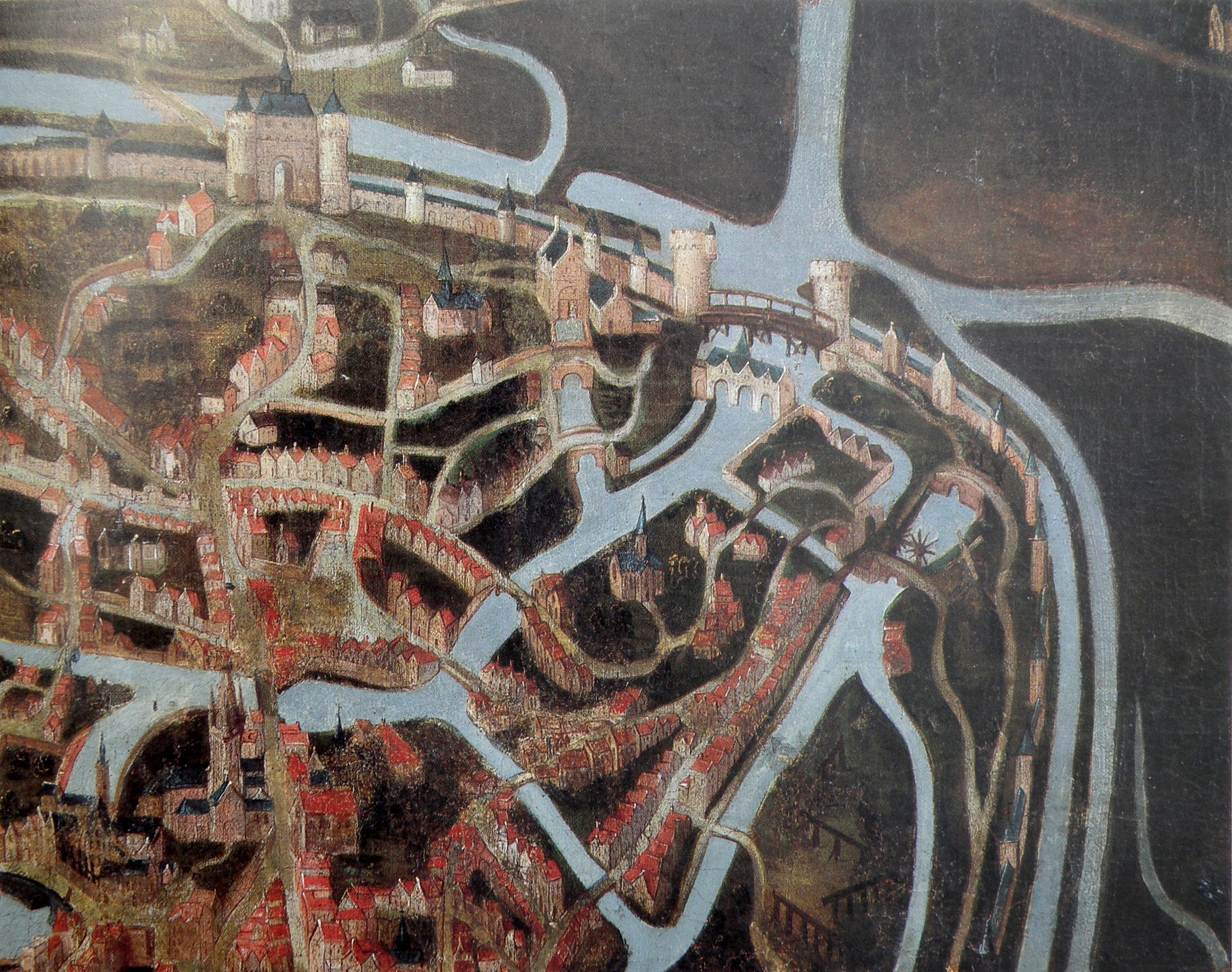 Zgn. Geschilderde plan, eind 15de of begin 16de eeuw.